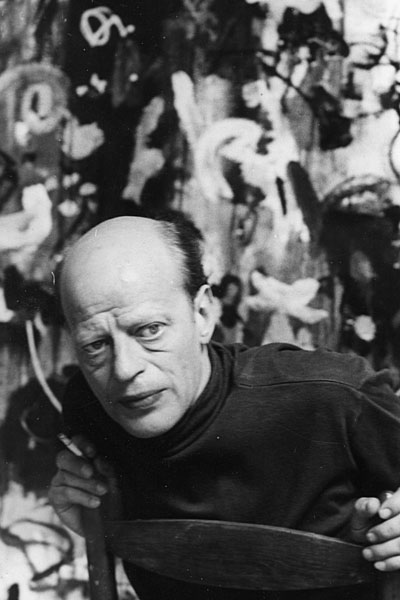 Foto des Soester Künstlers Hans Kaiser